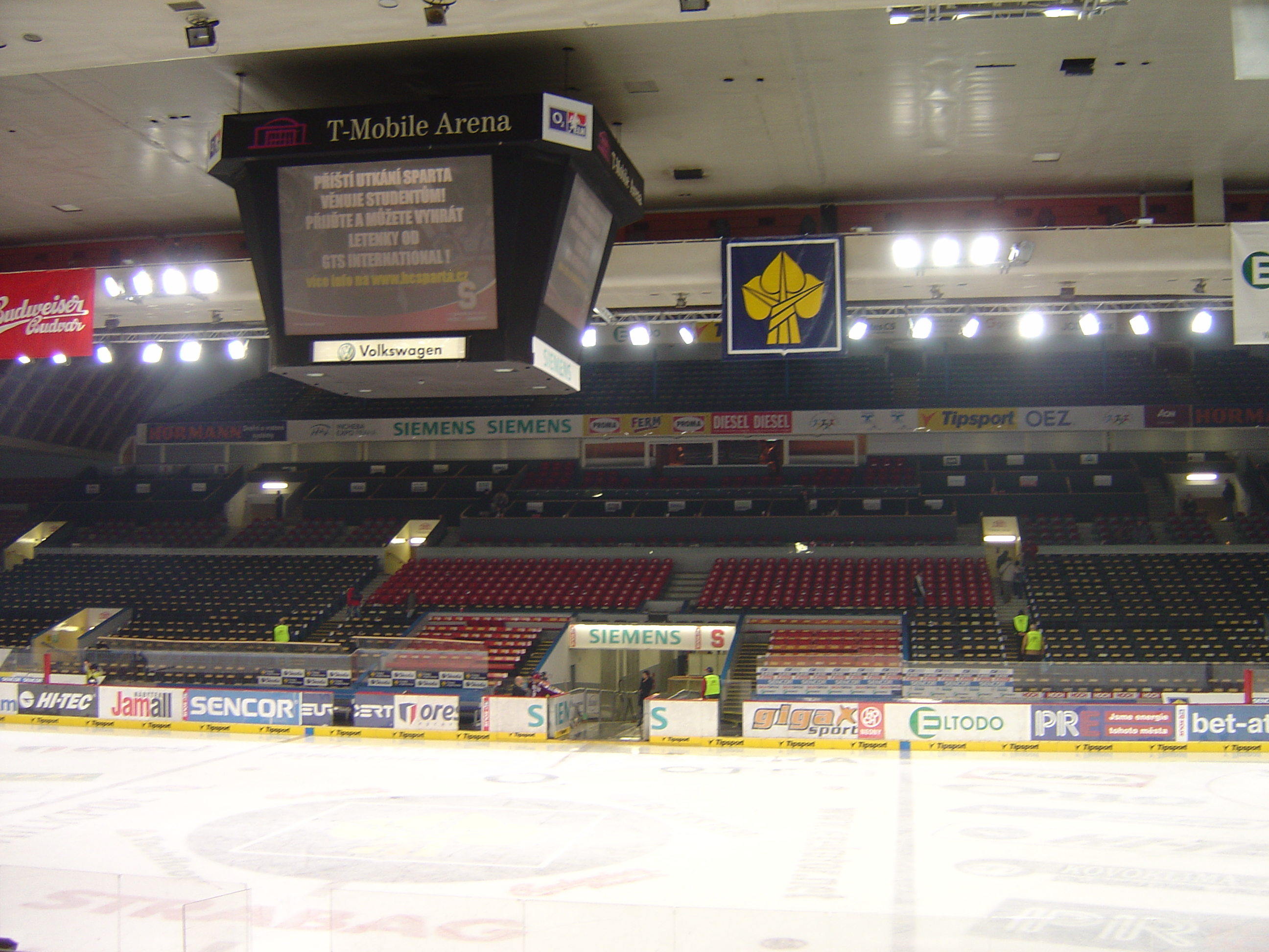 T-Mobile Arena, Prague, Czech Republic